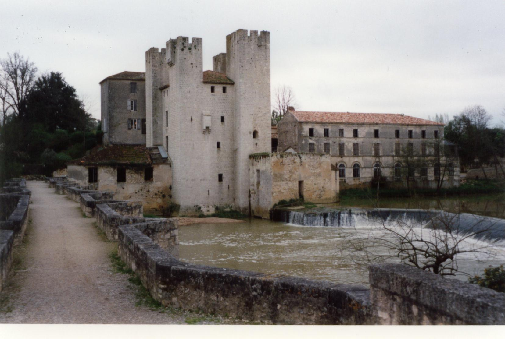 Moulin fortifié de Barbaste